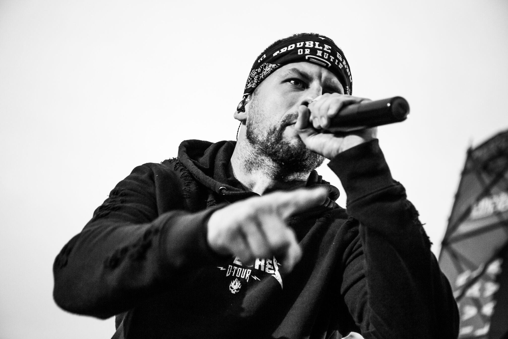 Marpo